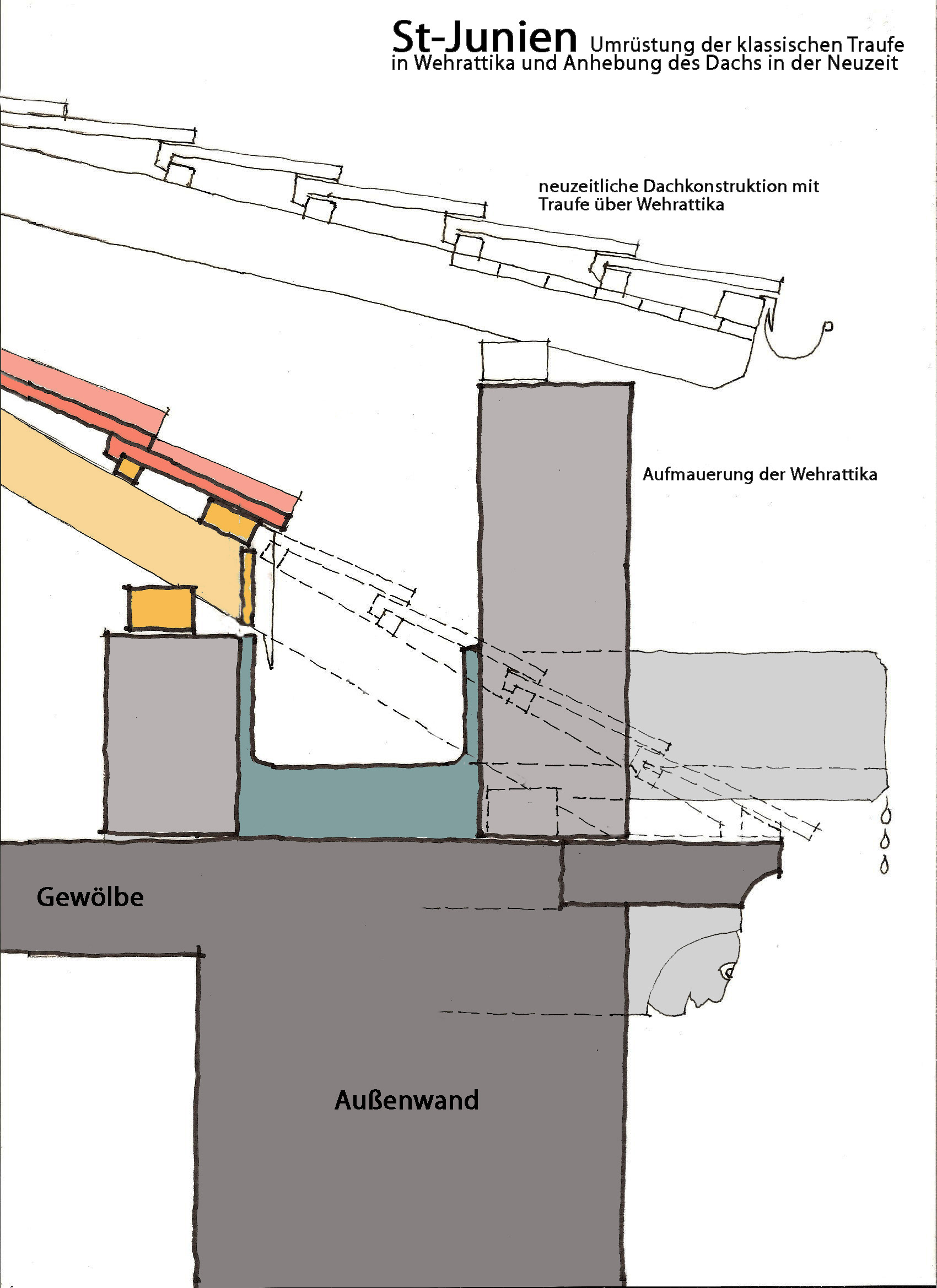 St-Junien, Wehrattika-Nachrüstung